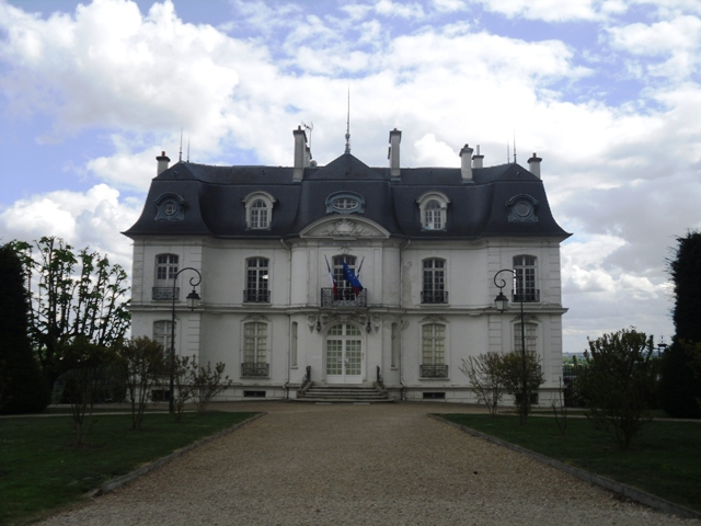 Hôtel-de-Ville d'Athis-Mons (Essonne, Île-de-France, France).